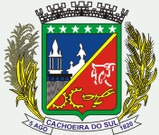 Brasão da cidade de Cachoeira do Sul